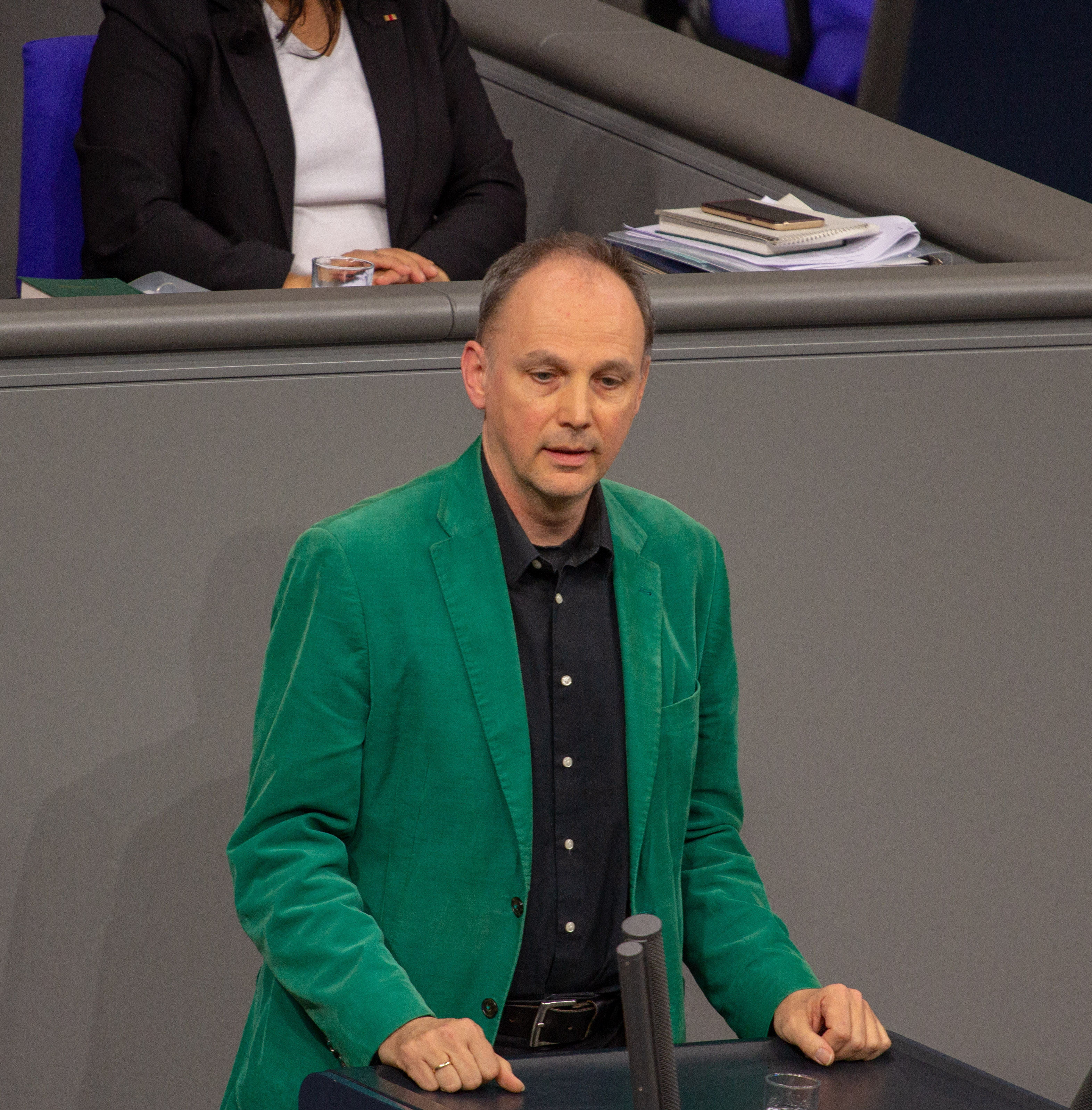 Wolfgang Strengmann-Kuhn, Mitglied des Deutschen Bundestages, während einer Plenarsitzung am 11. April 2019 in Berlin.